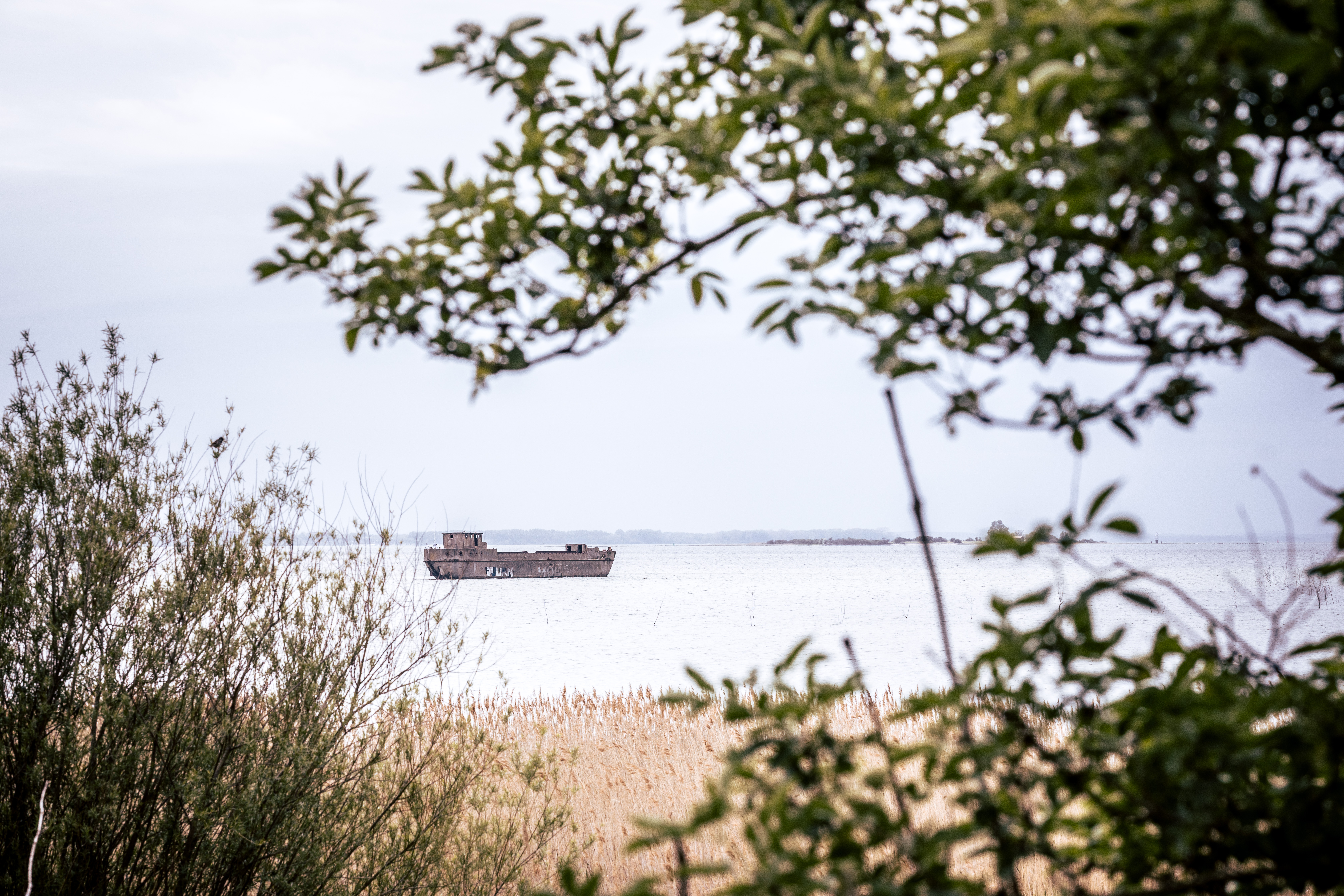 Gestrandetes Betonschiff in der Wismarer Bucht (Ostsee) vor Redentin, gesehen von Redentin